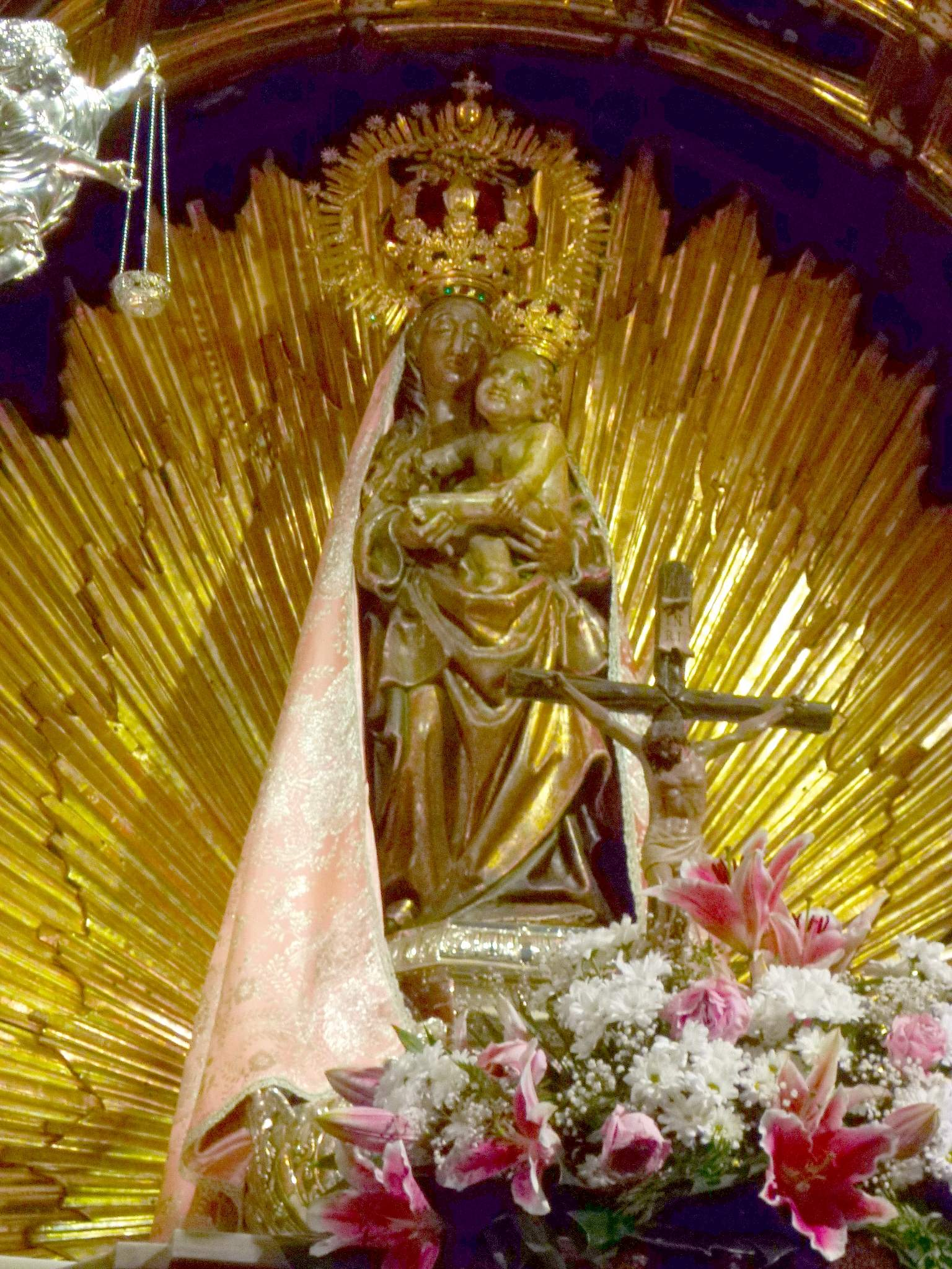 Ponferrada - Basilica de Nuestra Señora de la Encina